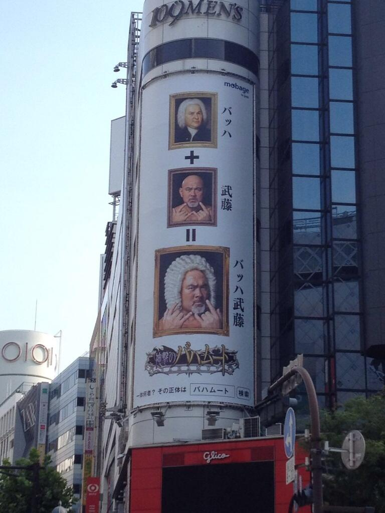 渋谷スクランブル交差点から撮影